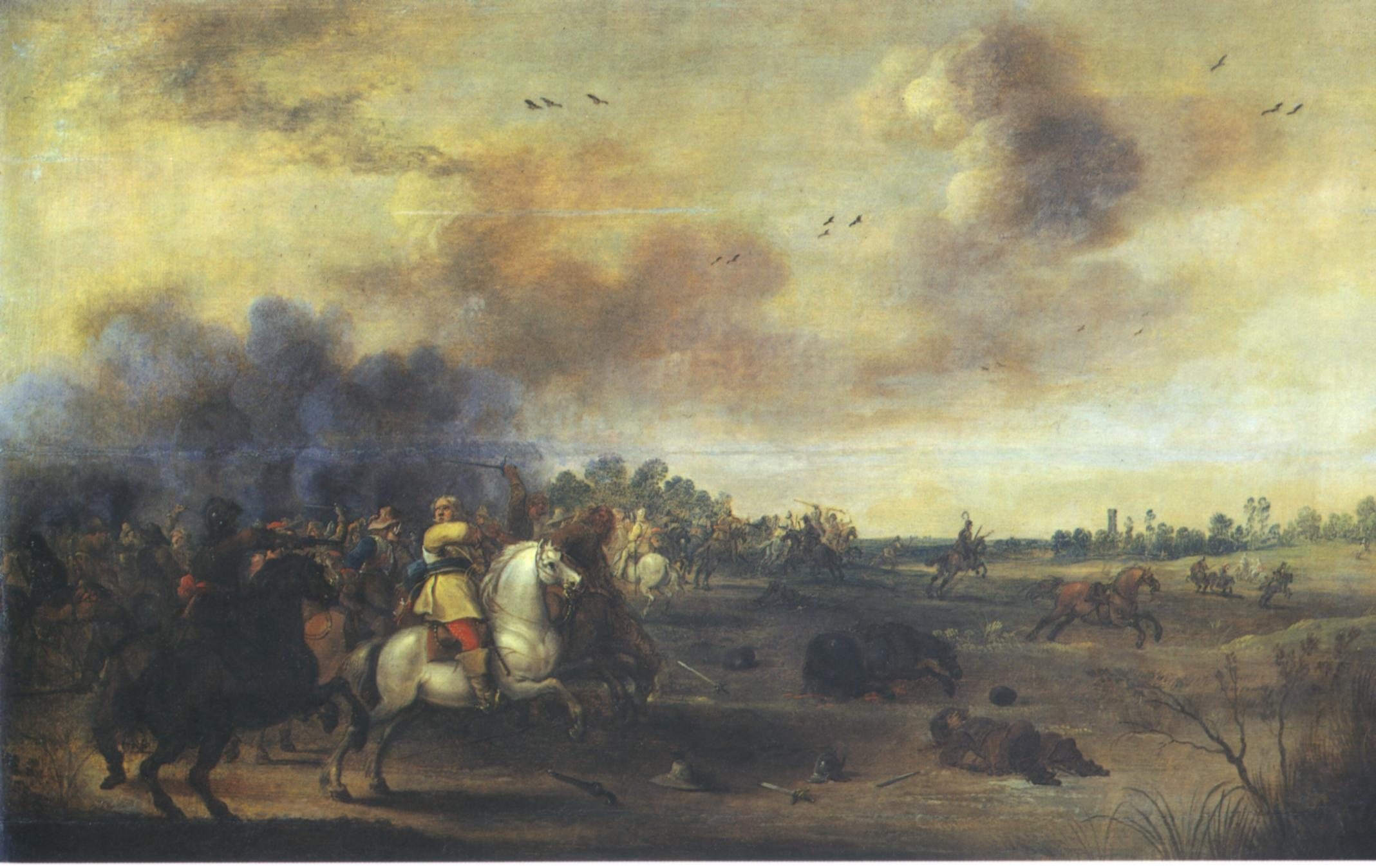 Gustav II. Adolf in der Schlacht bei Lützen am 16. November 1632